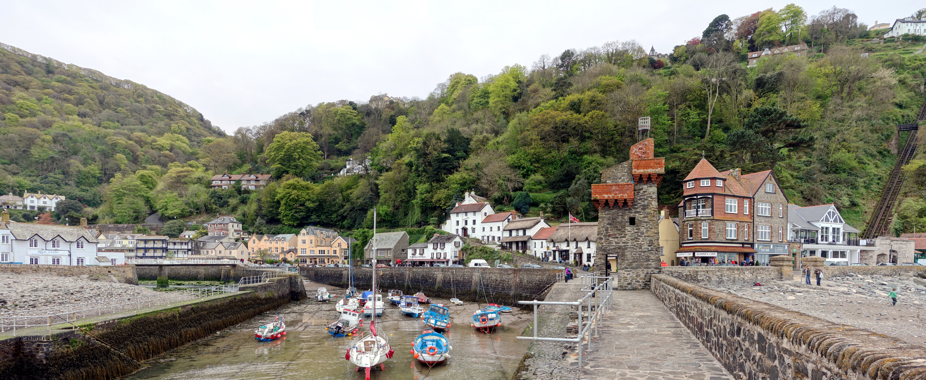 Vue de Lynmouth depuis la jetée du port.